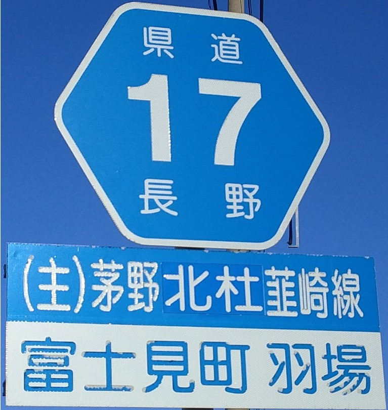 長野県道１７号線の路線番号標識